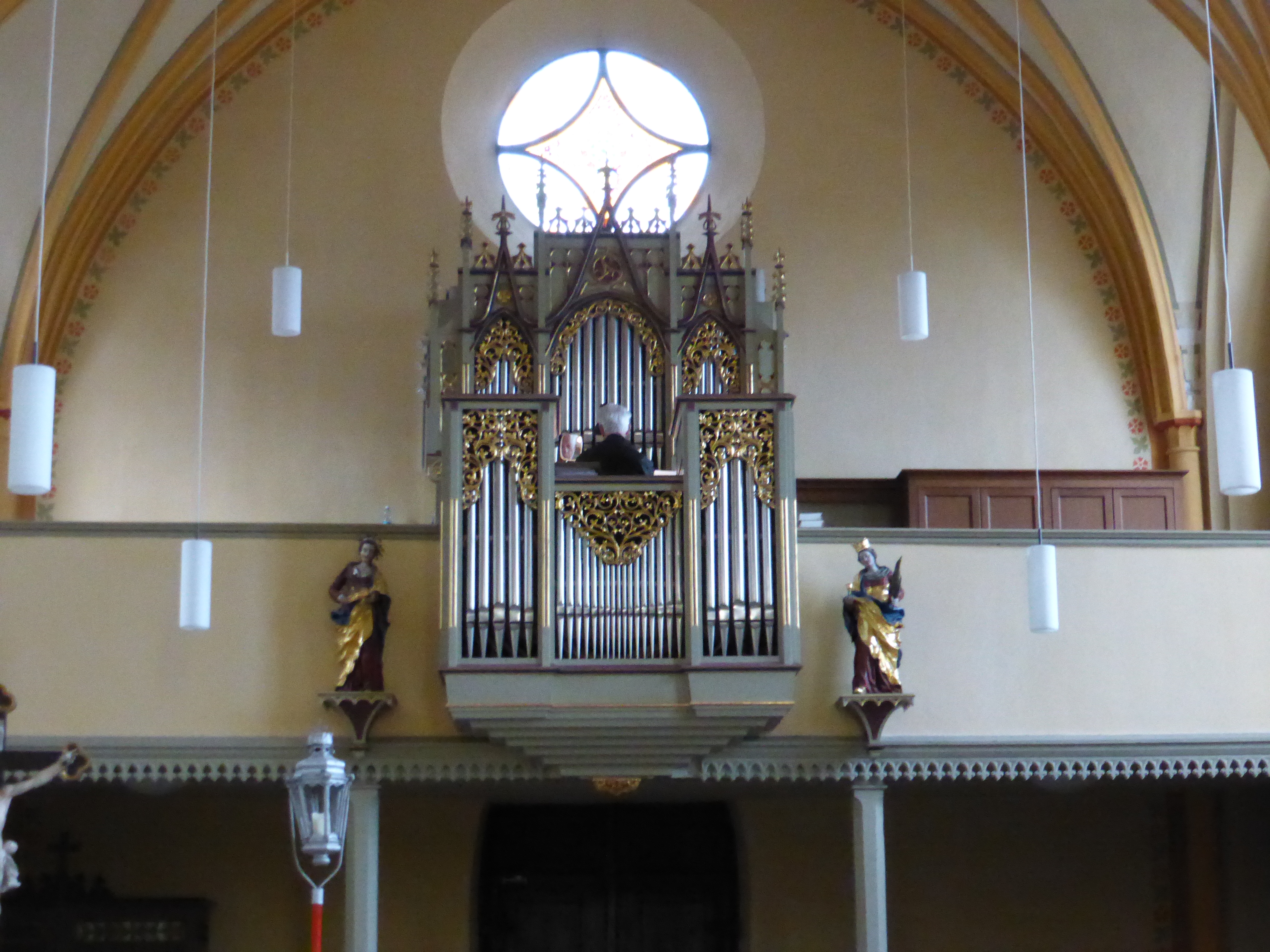 Reinisch-Orgel von 1981 in Hof bei Salzburg, mit neuem Rückpositiv. Das Hauptgehäus stammt aus dem Jahre 1863, die Orgel stellte Matthäus Mauracher I. 1860 auf, sie war von einem der Trompeterchöre des Salzburger Doms